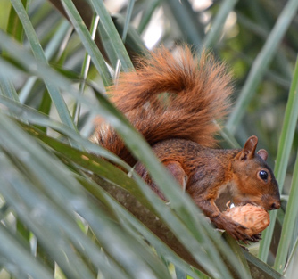 Sciuridae: Sciurus spadiceus